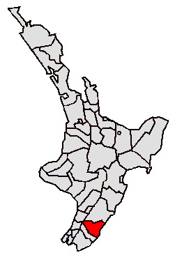 Die Karte zeigt die Lage des Masterton District Council auf der Nordinsel Neuseelands rot selbst erstellt Lizenz: Bild-GFDL